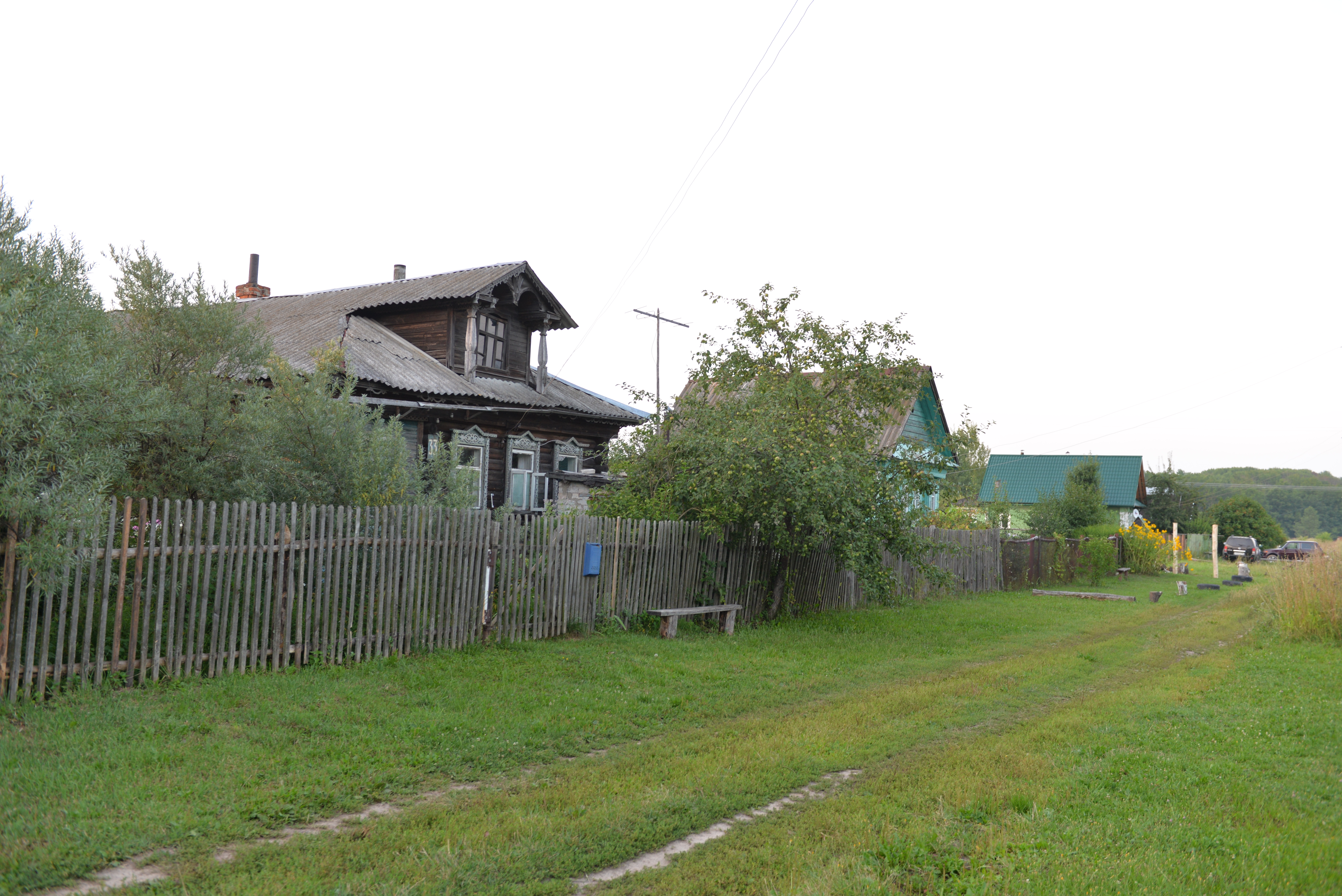 Одна из улиц в деревне Соловьево